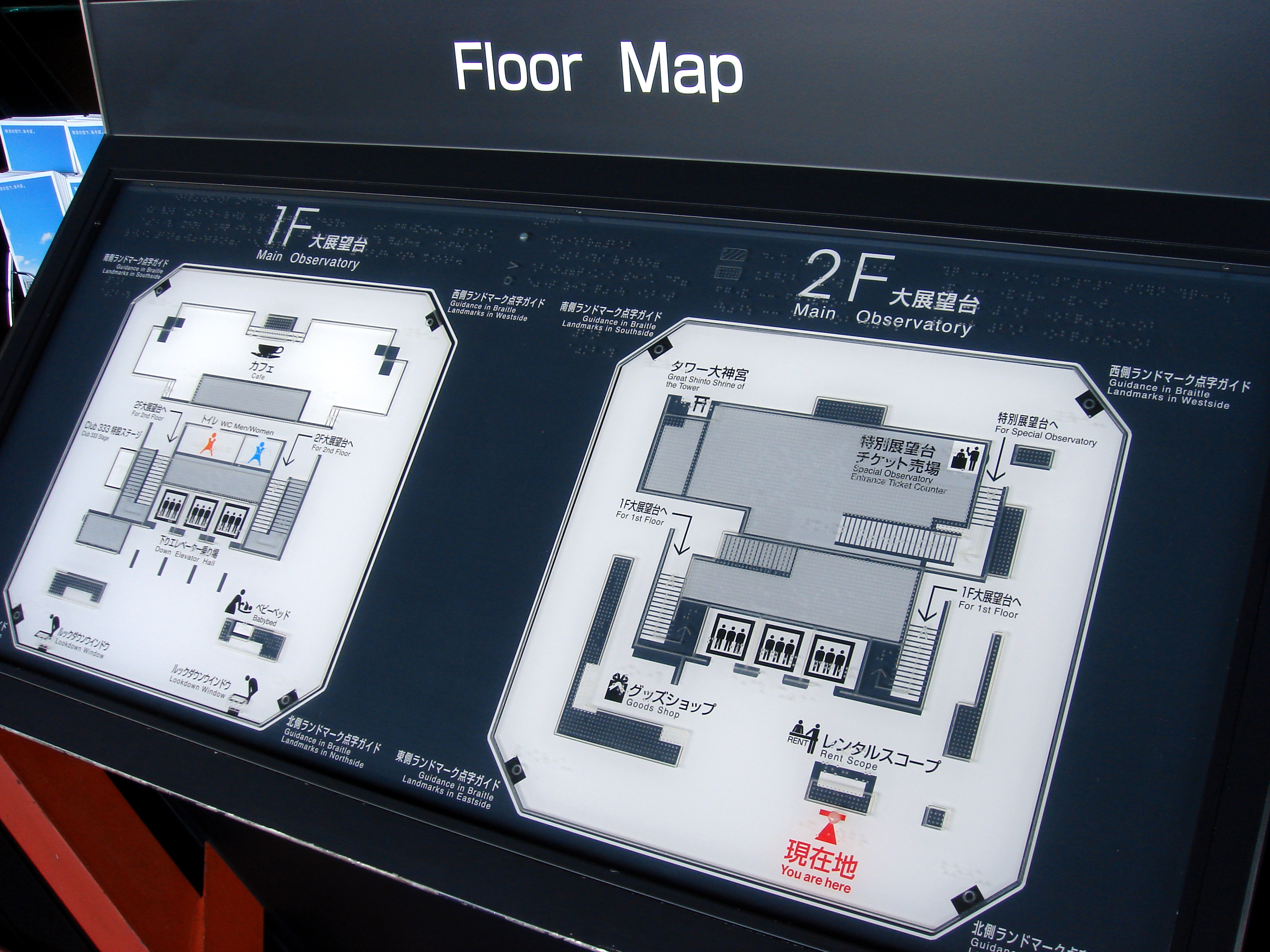 東京タワー大展望台のフロアマップ